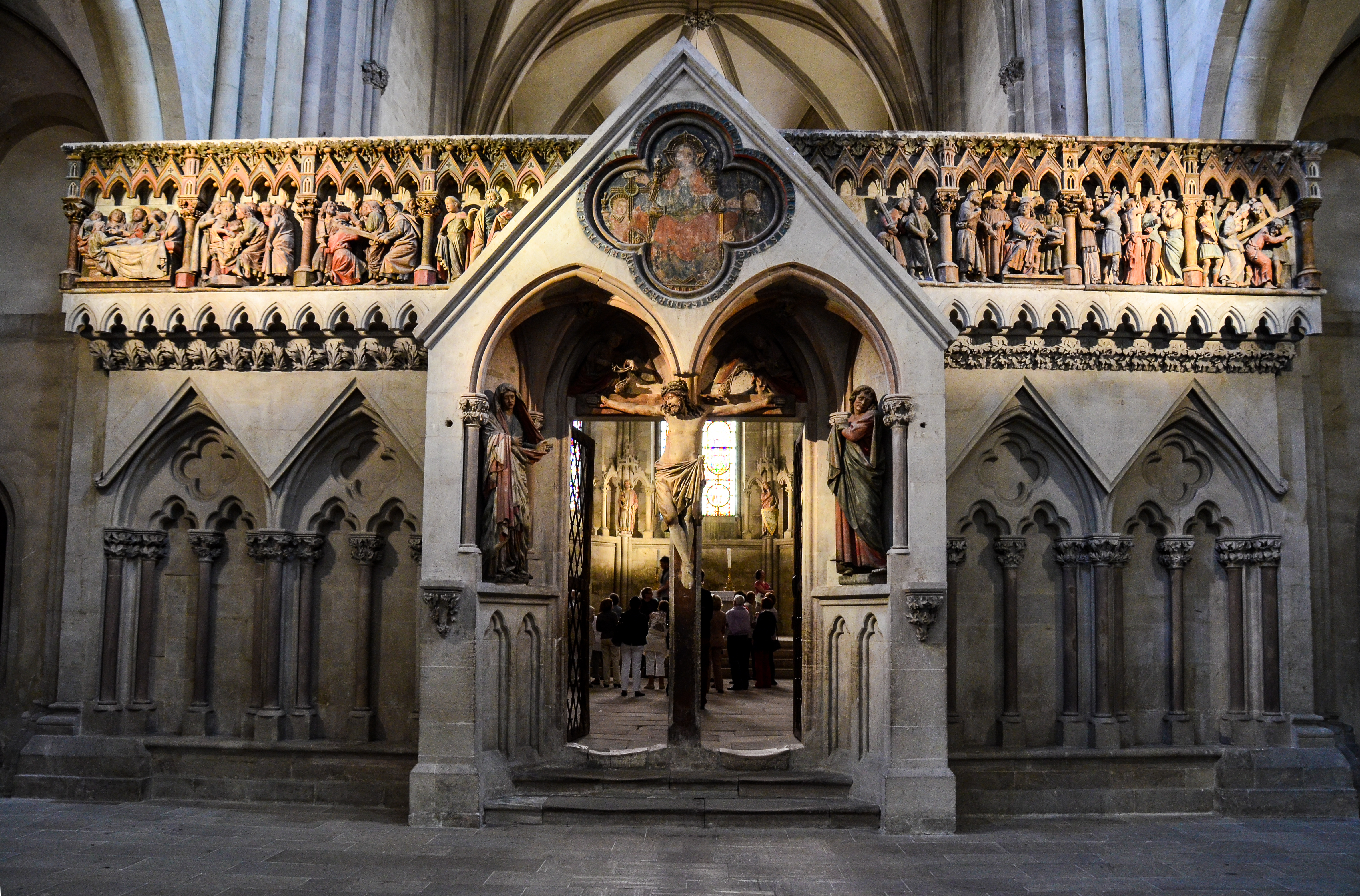 Lettner im Westchor des Naumburger Doms